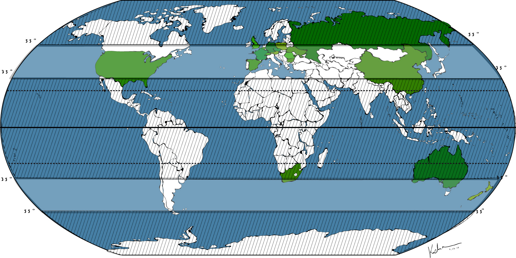 Mapa przedstawiająca kraje produkujące chmiel pomiędzy 35 a 55 stopniem szerokości N i S, opracowana na podstawie danych IHGC